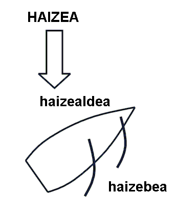 skemo pri vento, por aldoni propran priskribon